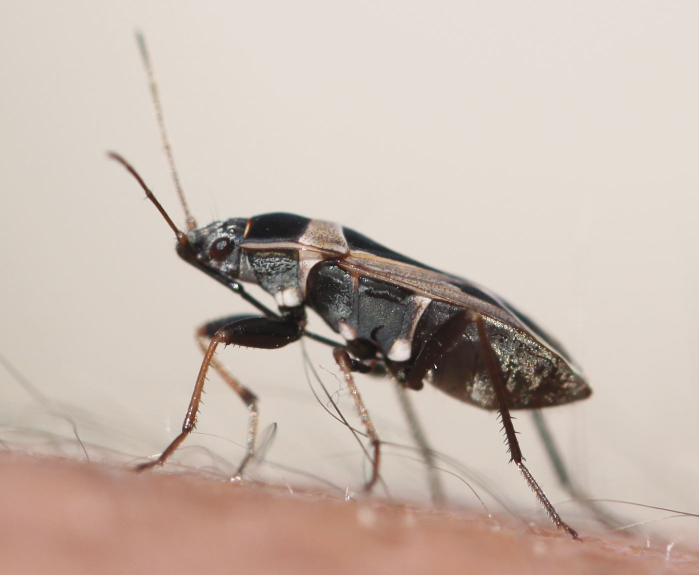 Wanze Xanthochilus saturnius, am 27. Juni 2019 an der Côte d’Azur